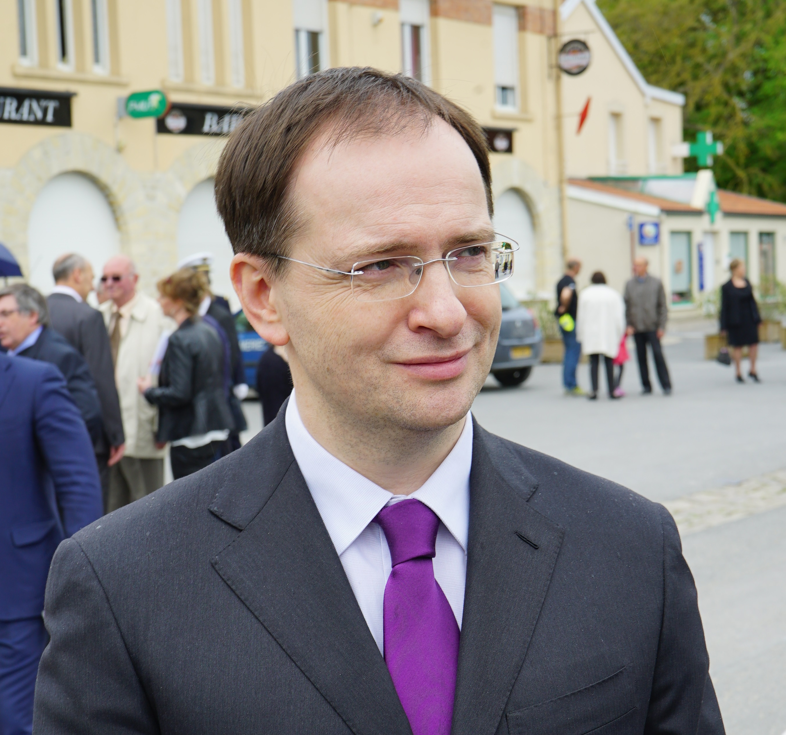 lors de la Visite en France de Vladimir Medinski en avril 2015.